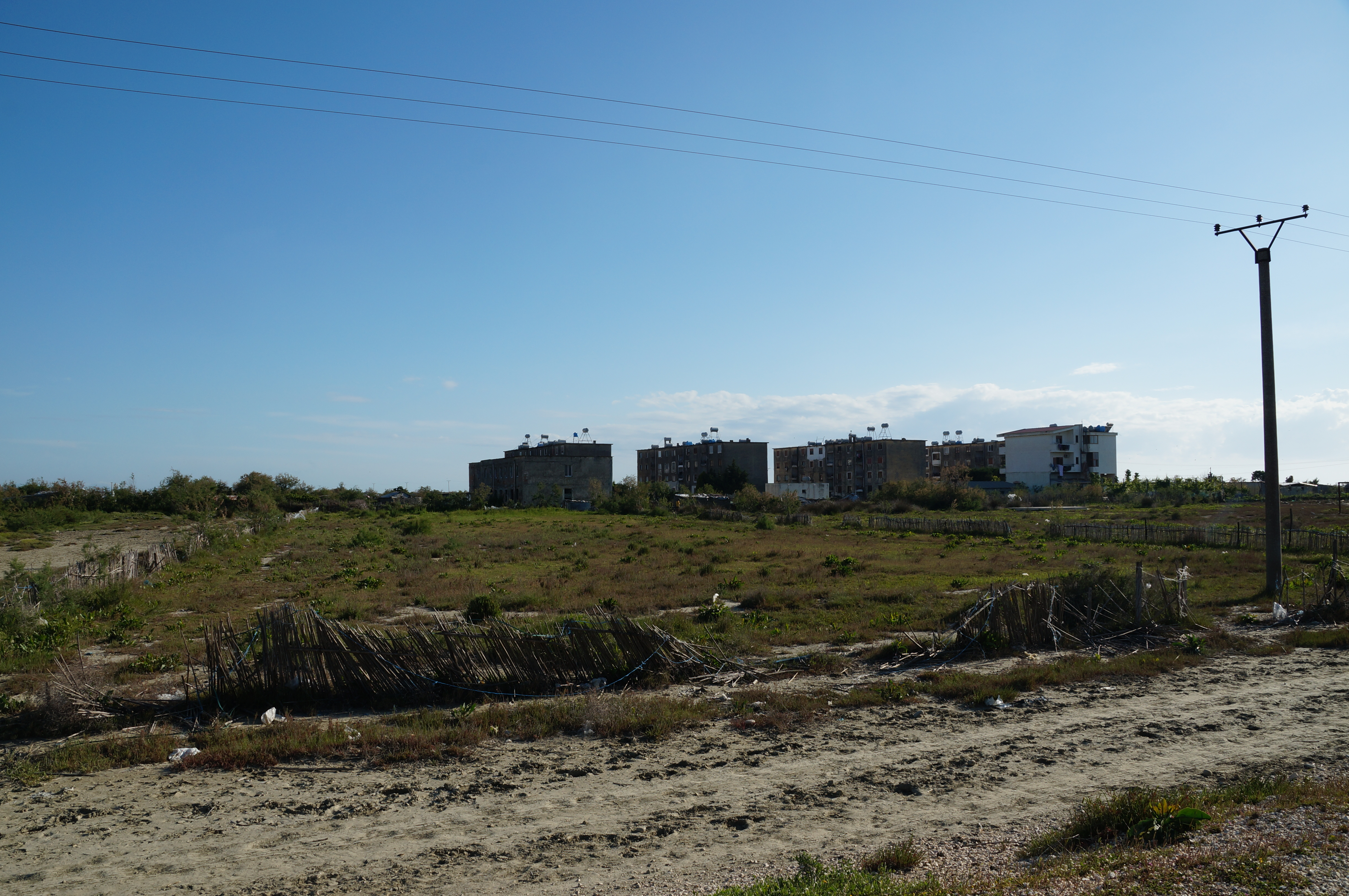 Adriatik village in Divjaka commune